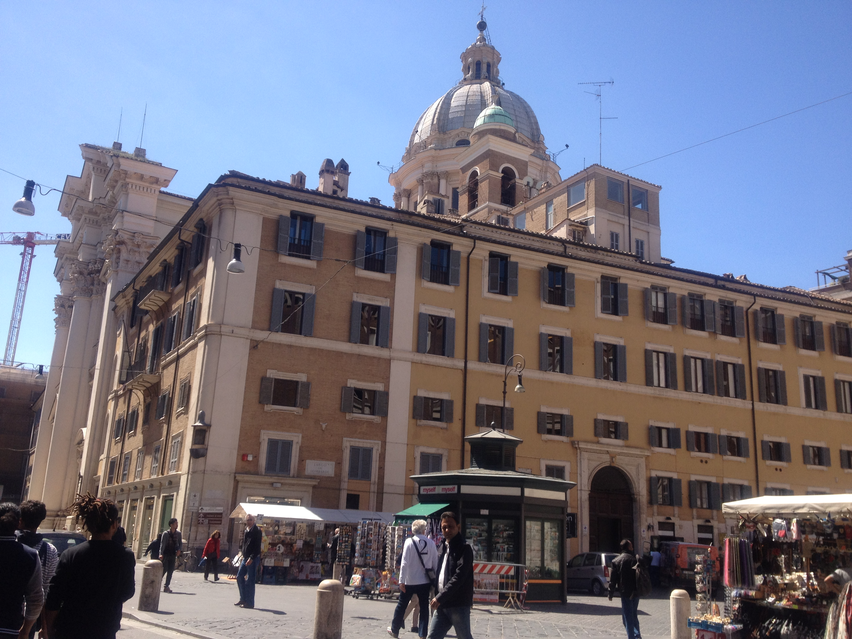 via del Corso